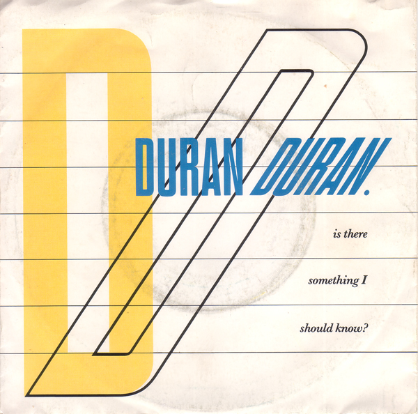 Is There Something I Should Know? Duran Duran 1981